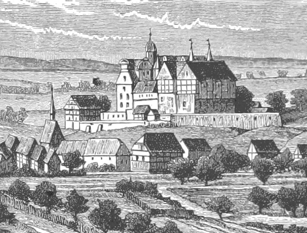 Heldenburg